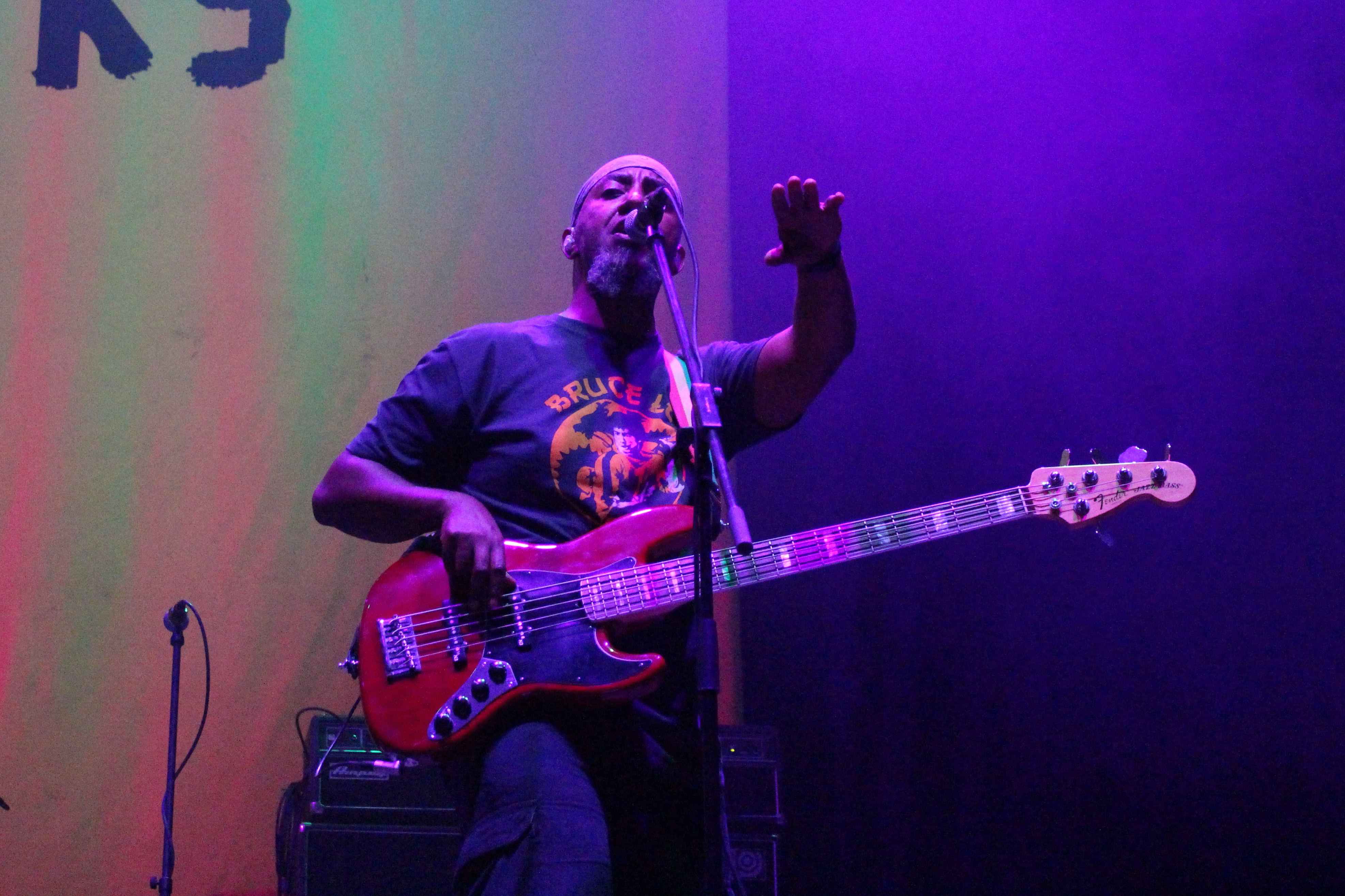 Festivalsommer This photo was created with the support of donations to Wikimedia Deutschland in the context of the CPB project "Festival Summer".